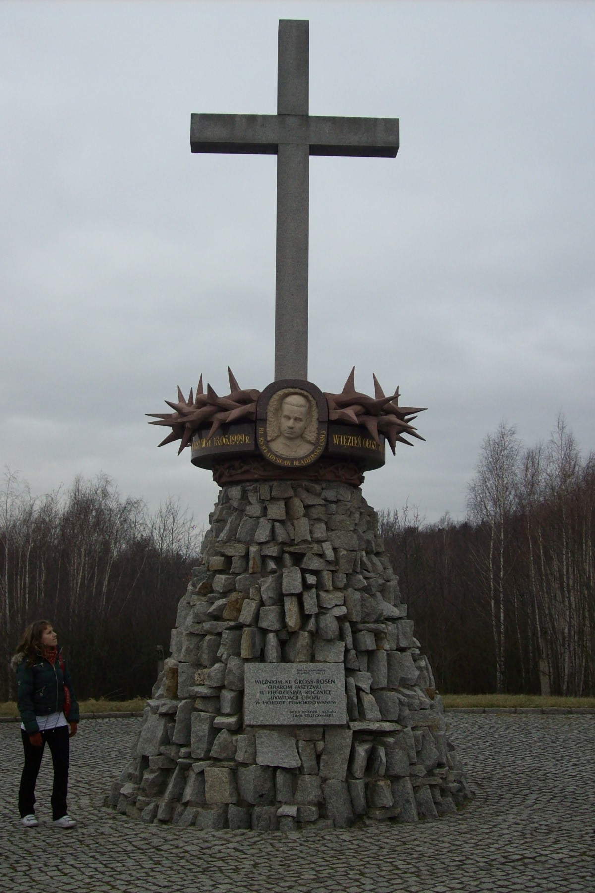 Pomnik w hołdzie pomordowanym ufundowany przez lokalne społeczeństwo w pięćdziesiątą rocznicę likwidacji obozu